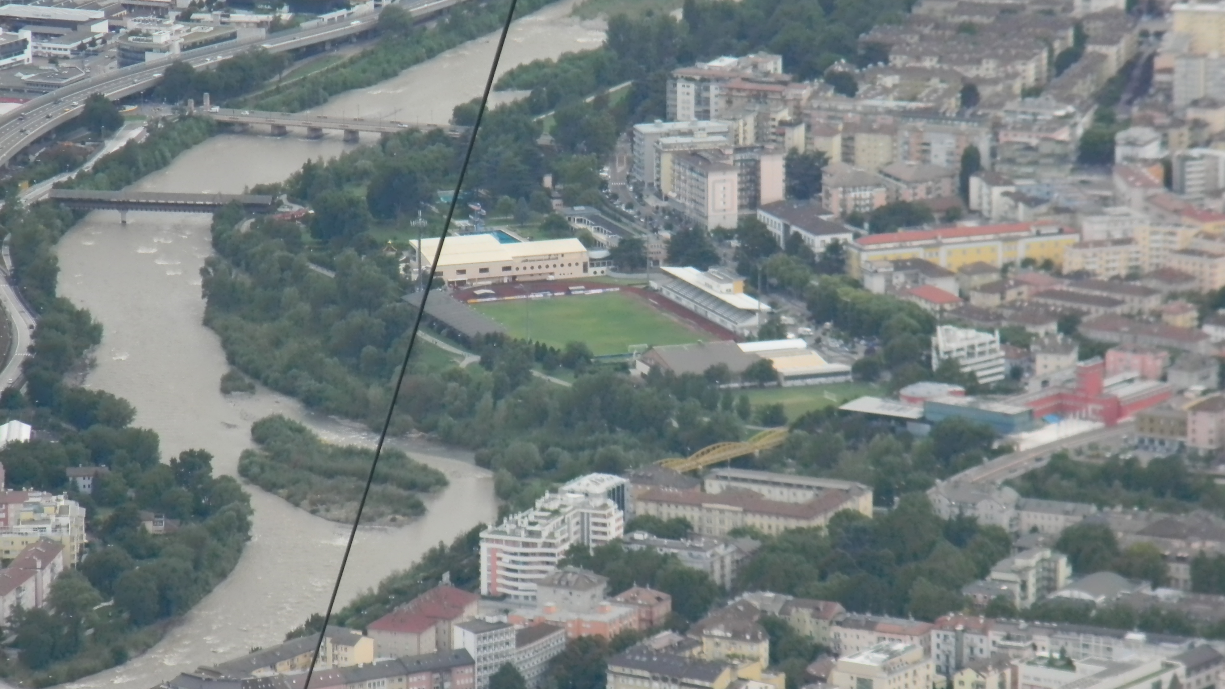 Il campo sportivo Druso di Bolzano visto dalla funivia del Renon.